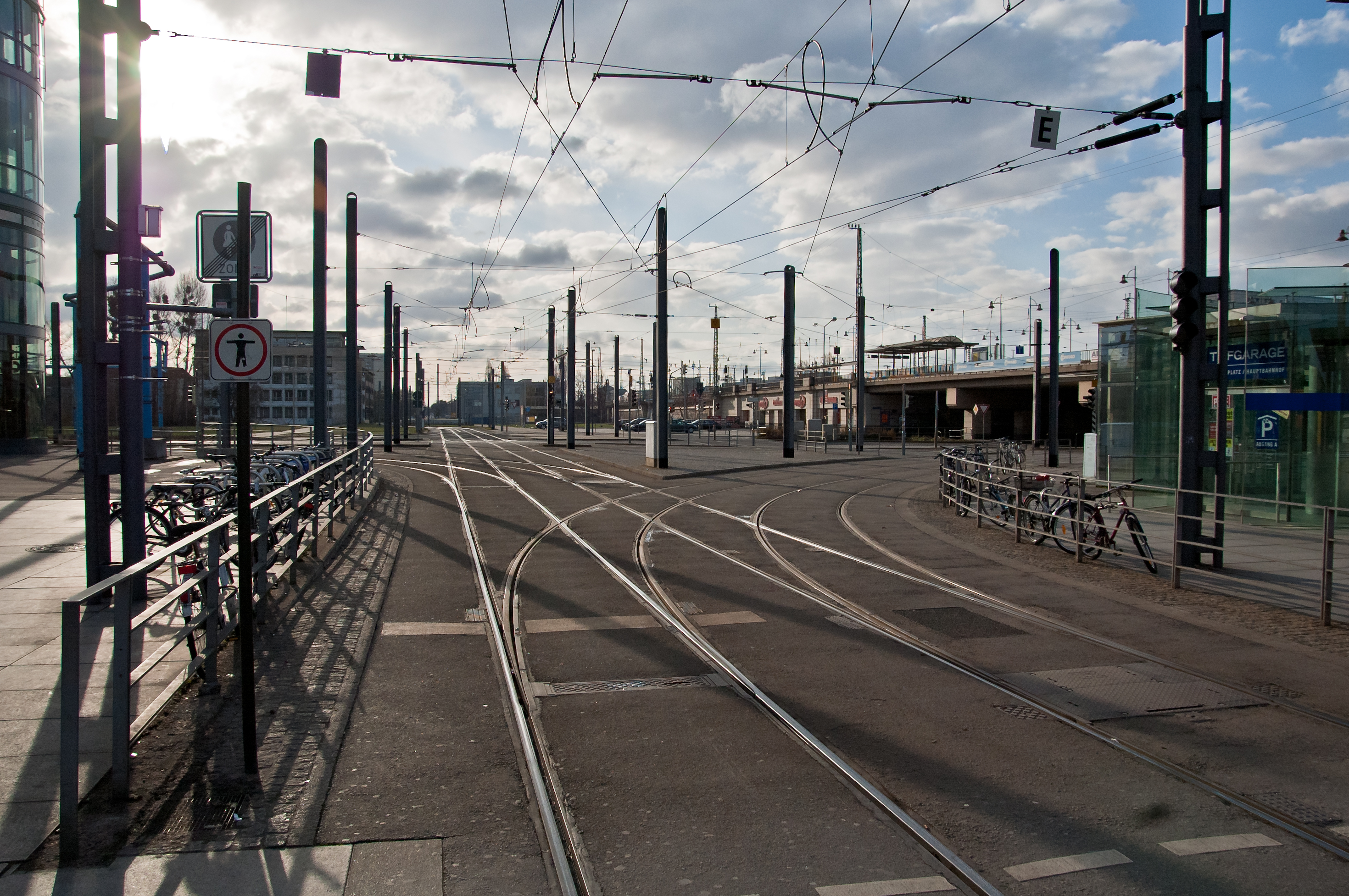 Straßenbahngleise am Dresdner Hauptbahnhof (von der Kreuzung mit der Prager Straße Richtung Osten gesehen)